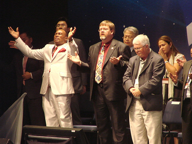 Молитва